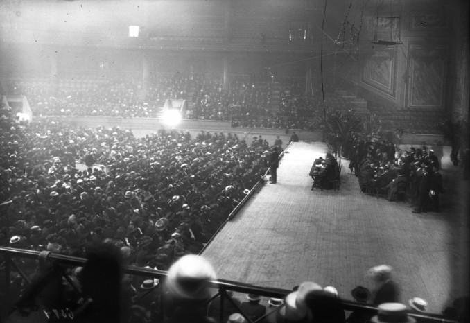 Grève des postiers à l'hippodrome, meeting du 14 mai 1909, Pataud [secrétaire du syndicat des électriciens] à la tribune : [photographie de presse] / [Agence Rol]